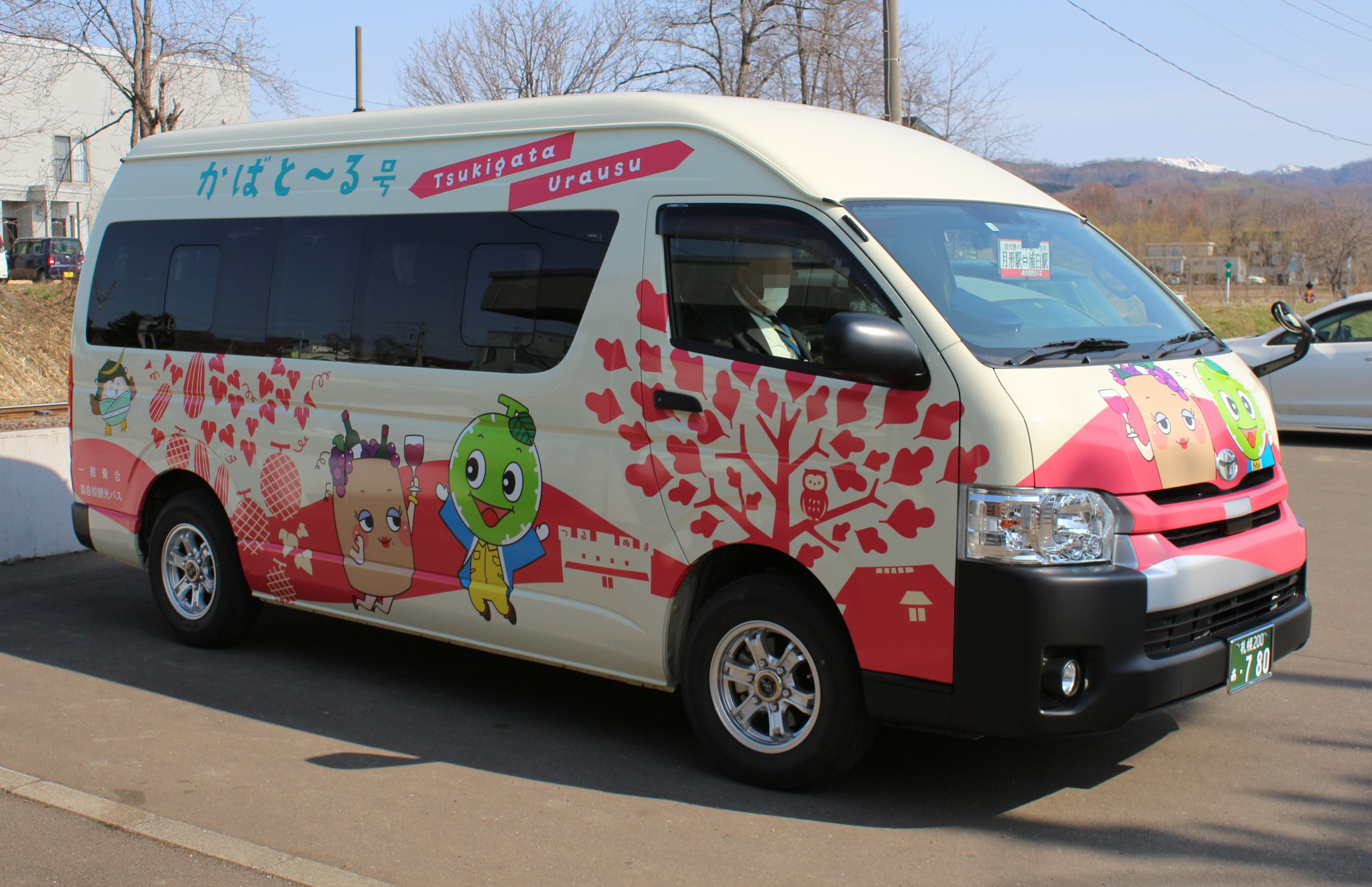 札沼線代替バス・月形浦臼線「かばと～る号」